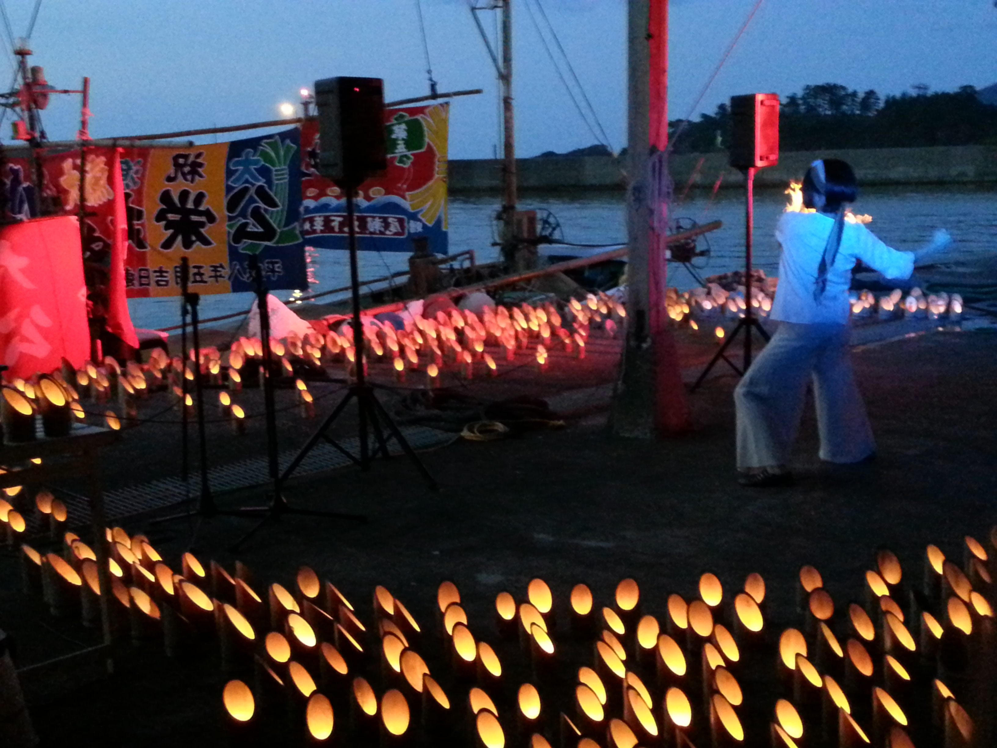 2014/７/28 京丹後市丹後町中浜漁港でのイベント 竹灯りでダンスパフォーマンス